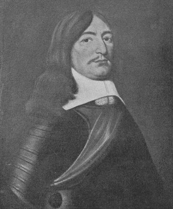 Friedrich Wilhelm I., Kurfürst von Brandenburg, Gemälde im Oberen Schloss (Seite 51, Abb. 53)